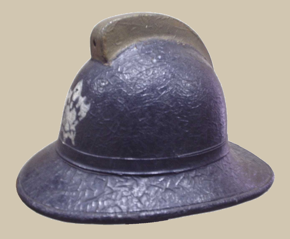 Capacete Merryweather, modelo nº 8, adquirido em 1951 pelo Corpo de Bombeiros do Paraná.